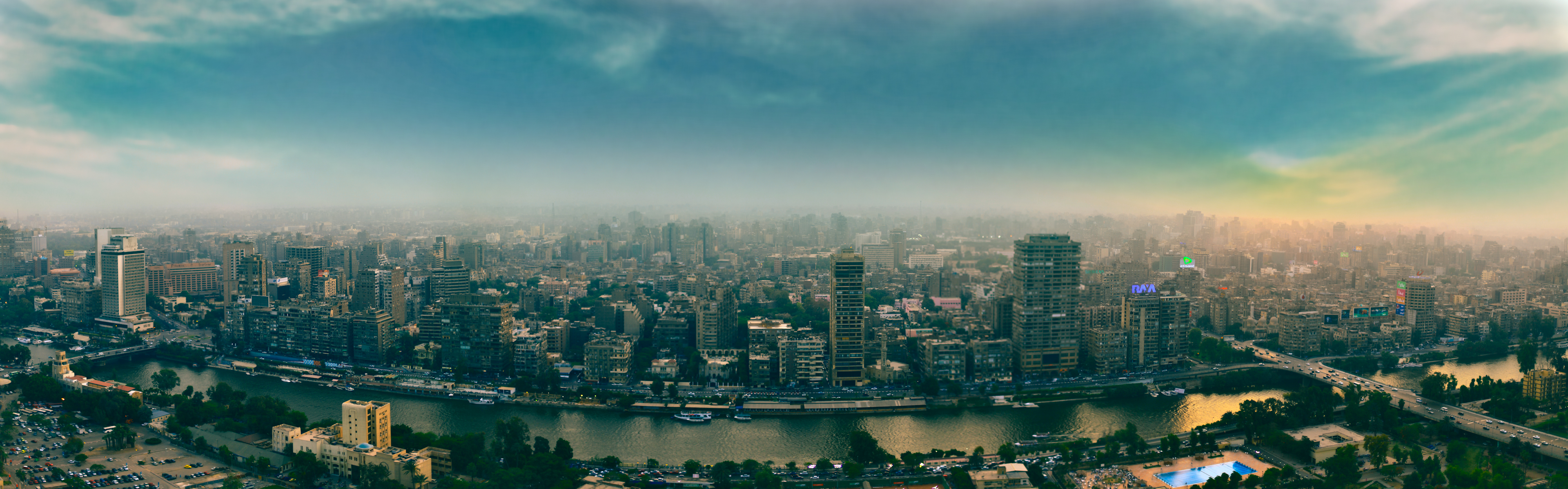 May 19 2011